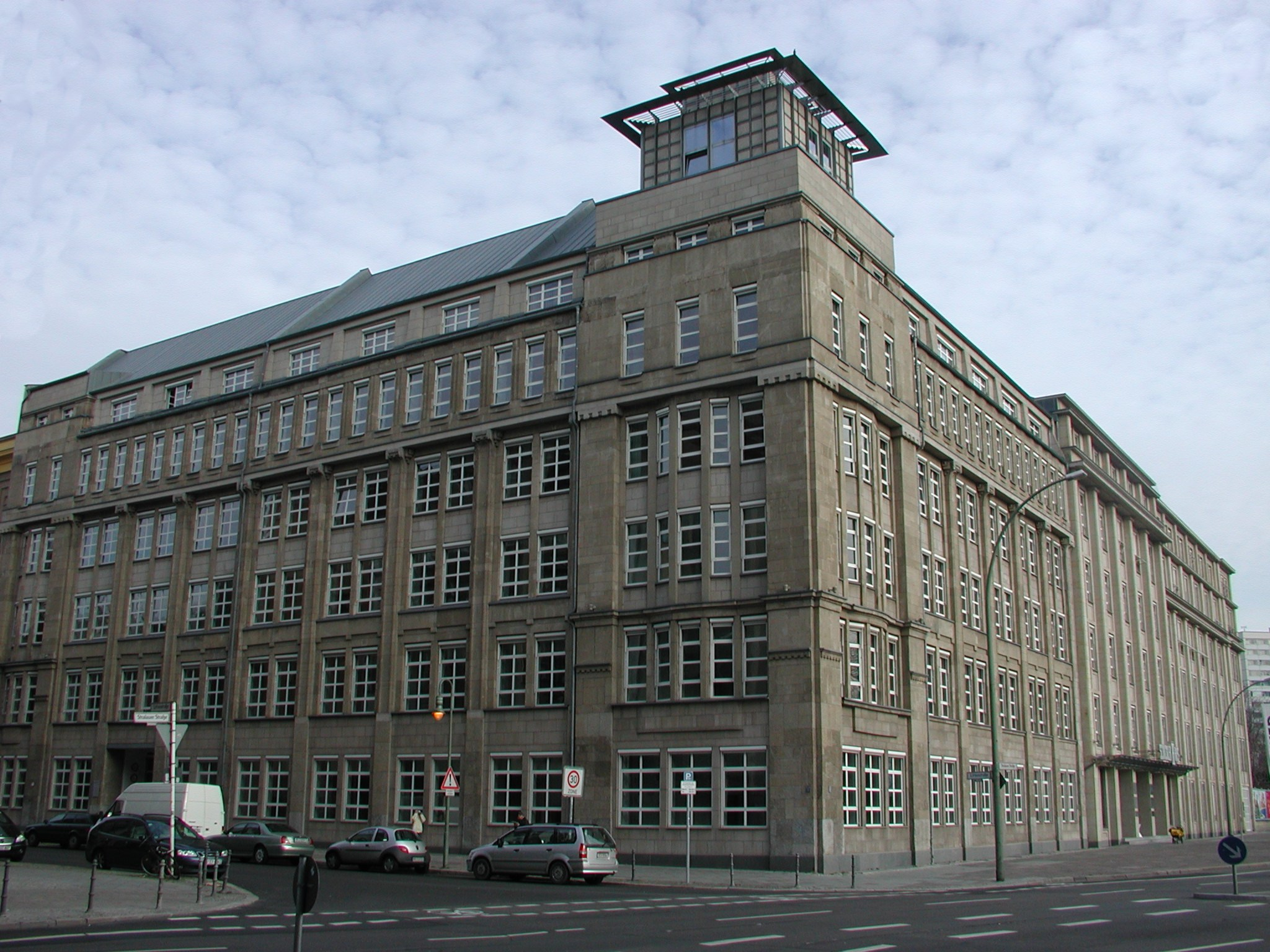 Gesamtansicht des Schicklerhauses in Berlin